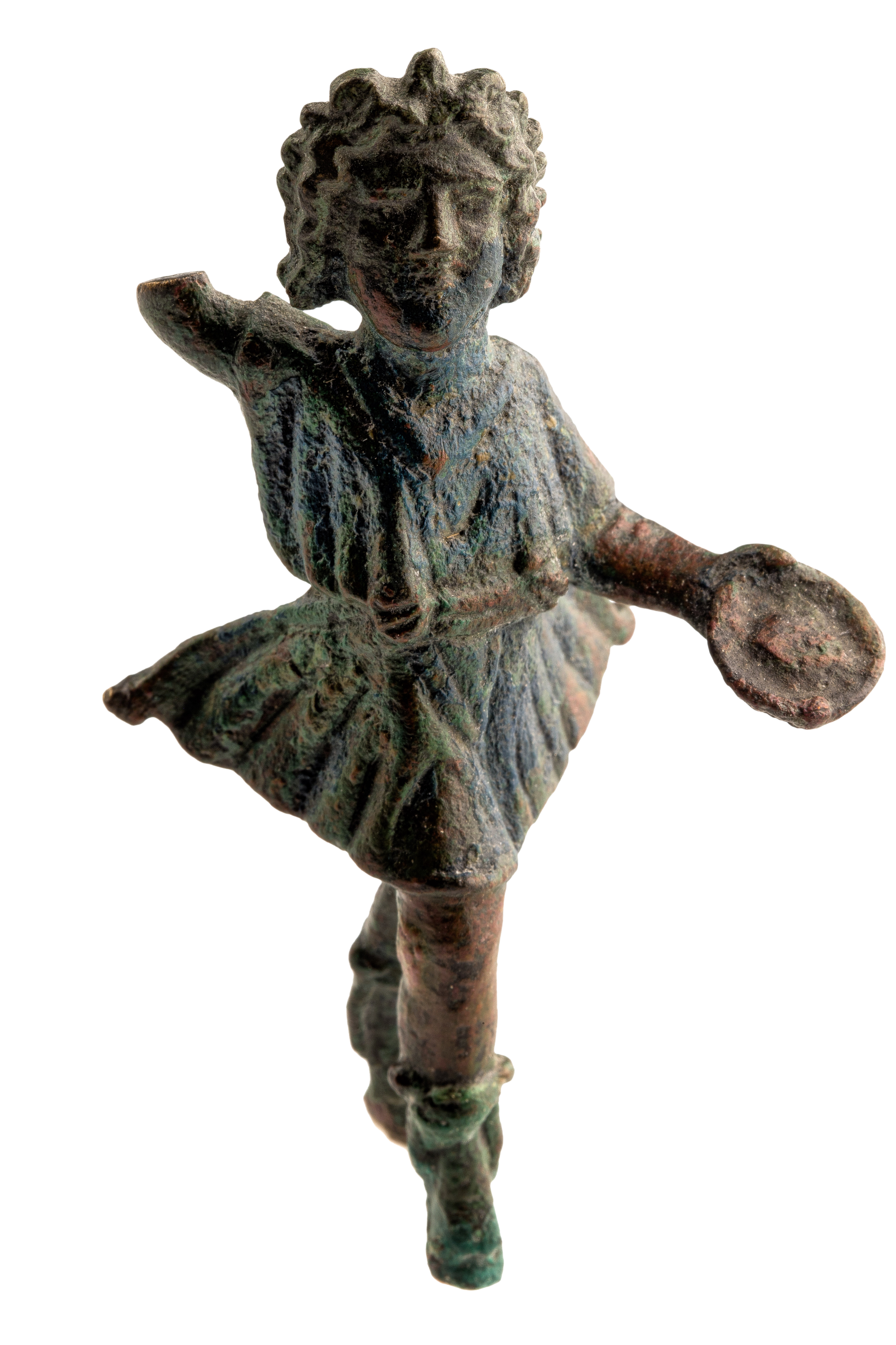 Figurine van een Lar in brons, 0 tot 200 NC, vindplaats: Onbekend, collectie Gallo-Romeins Museum Tongeren, 73.L.1